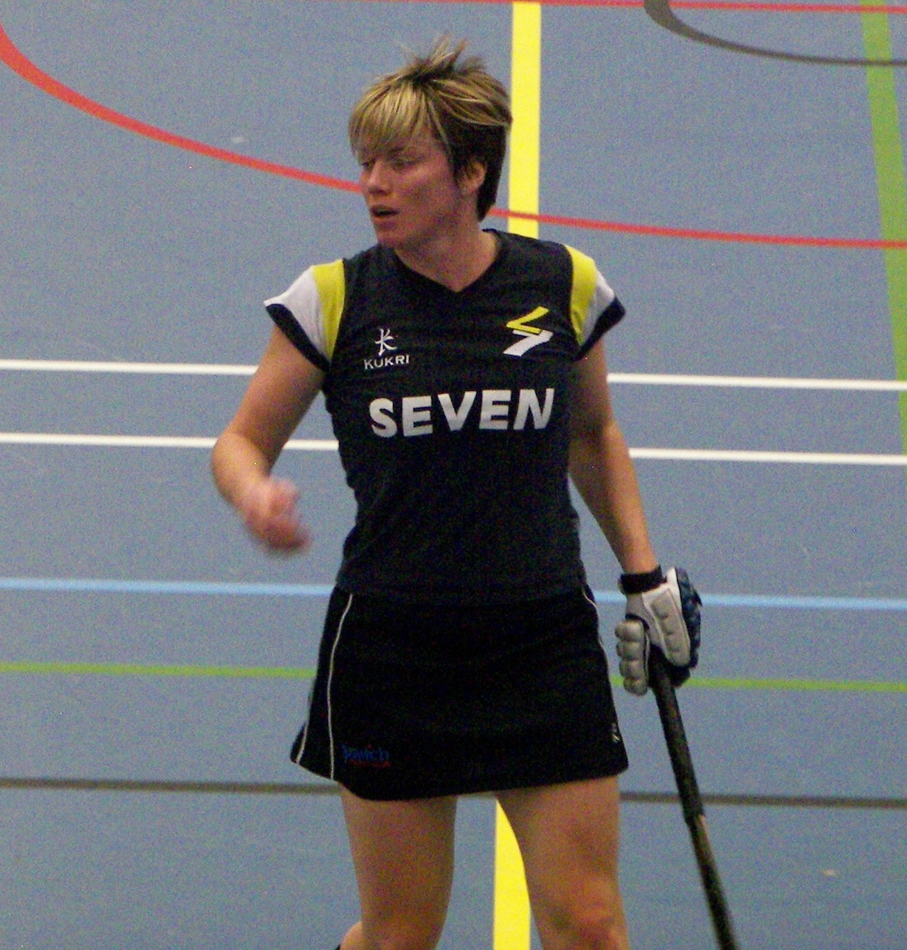 Leisa King